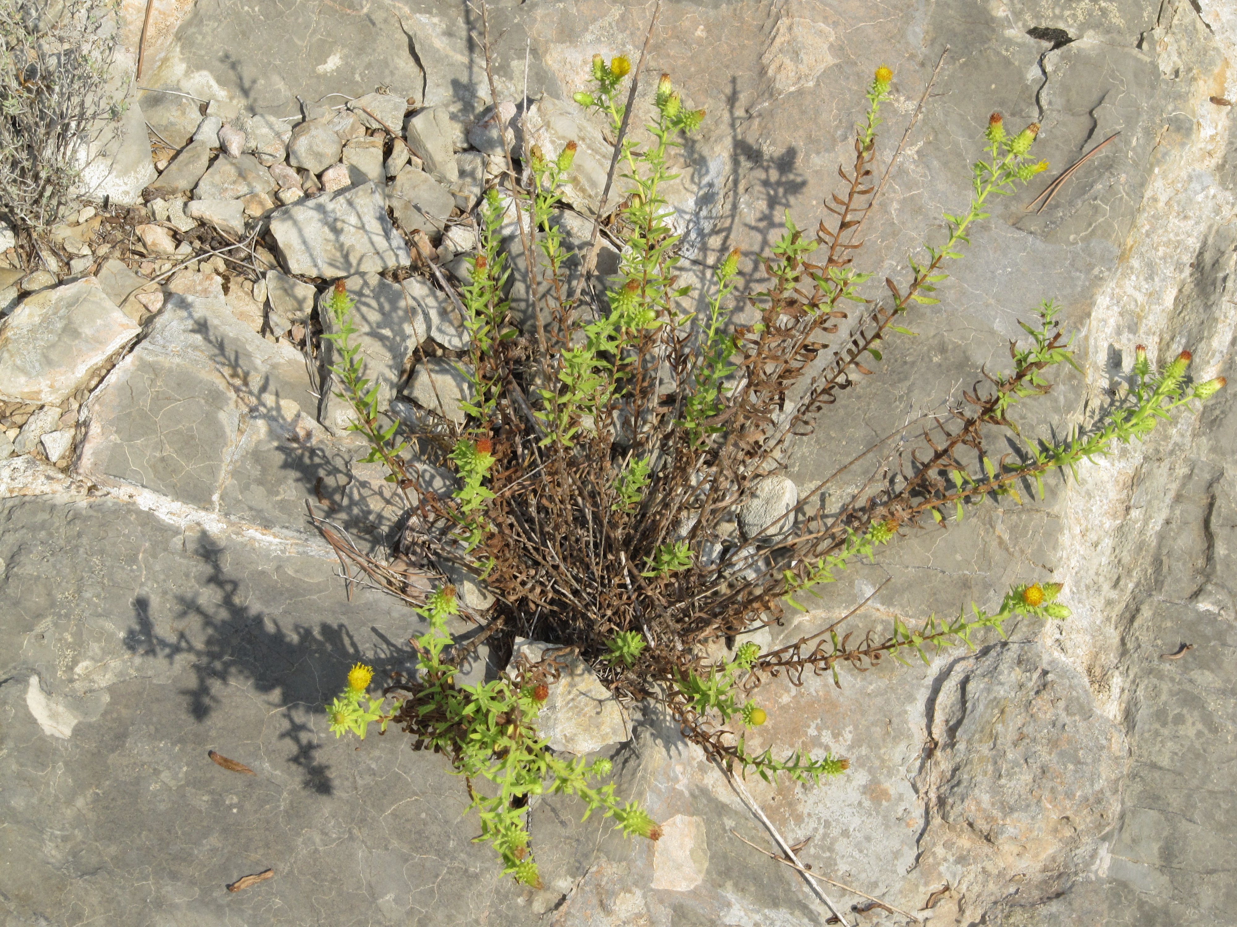 Te de roca a les muntanyes de Castelló